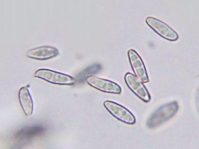 Tylopilus felleus (Bull.) P. Karst.